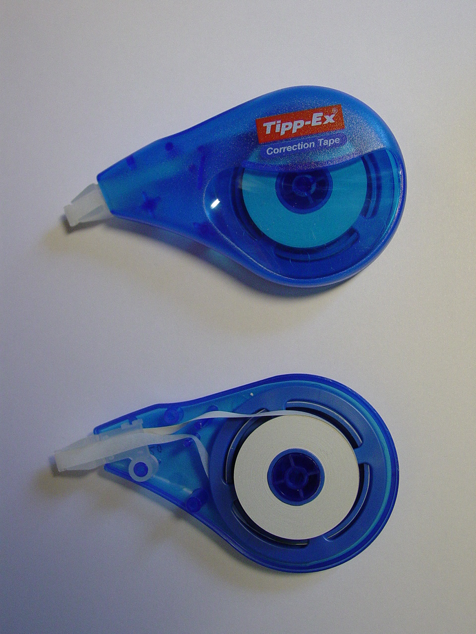 Blancoroller